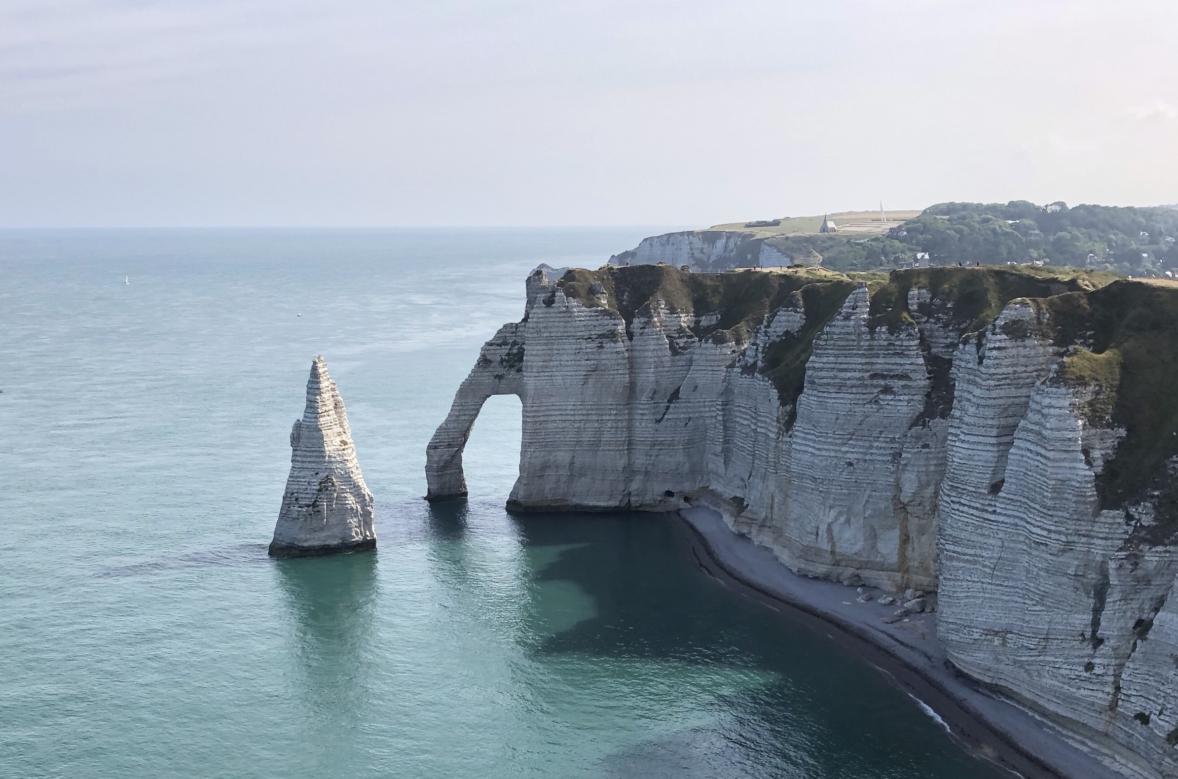 Falaise d Aval in Etretat